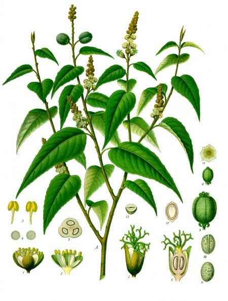 Kaskarillabaum. Croton Eluteria Benn. A Blüthenzweig, natürl. Grösse. 1 männliche Blüthe, vergrössert; 2 dieselbe im Längsschnitt, desgl.; 3 Staubgefässe, desgl.; 4 Pollen, desgl.; 5 weibliche Blüthe, desgl.; 6 dieselbe im Längsschnitt, desgl.; 7 Fruchtknoten im Querschnitt, desgl.; 8 Frucht, natürl. Grösse; 9 dieselbe, vergrössert; 10 und 11 Same von der Bauch- und Rückenseite, desgl.; 12 und 13 derselbe im Längs- und Querschnitt, desgl.; 14 Schuppe, desgl.